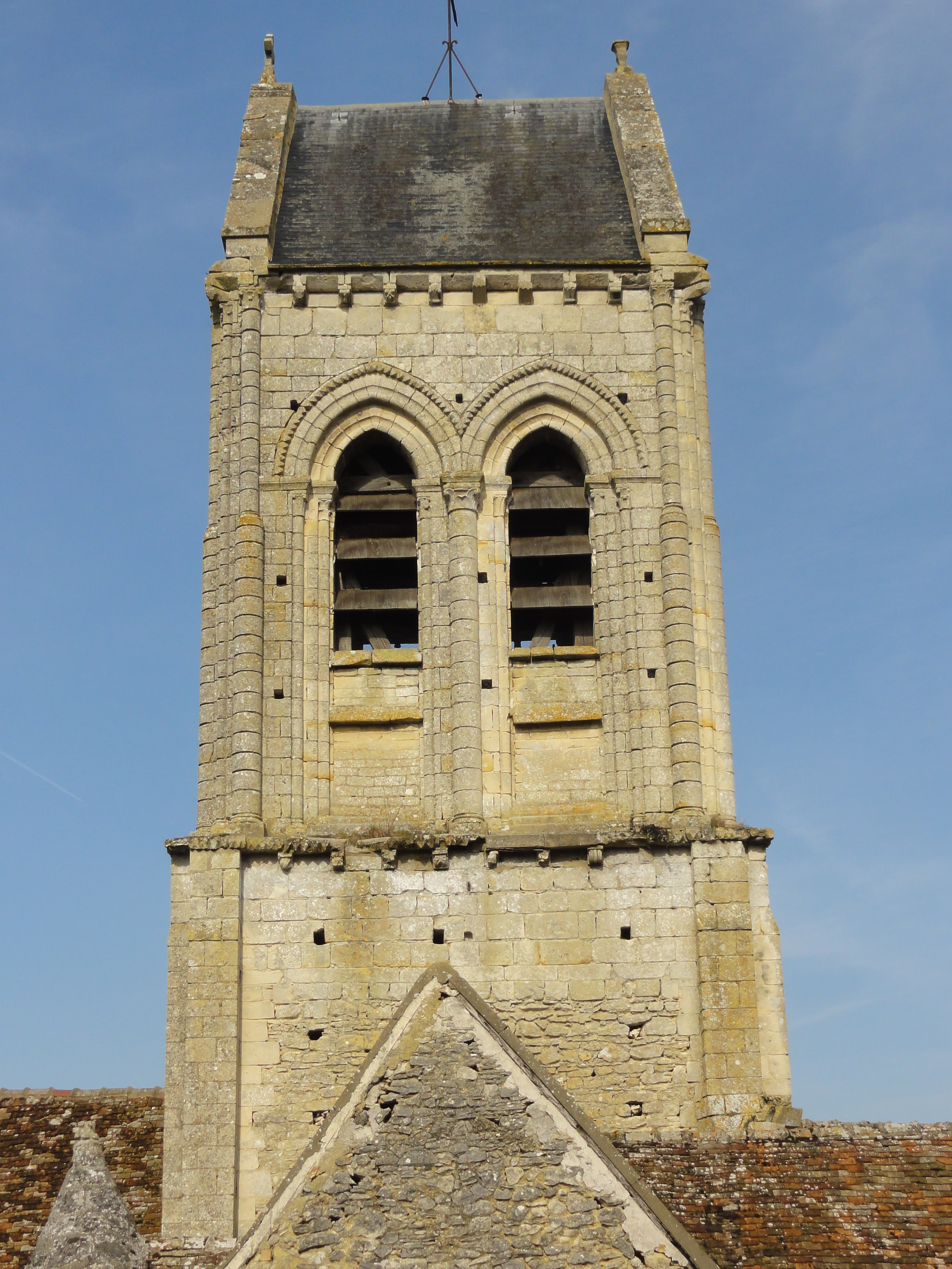 Église Saint-Léger de Delincourt - voir titre.